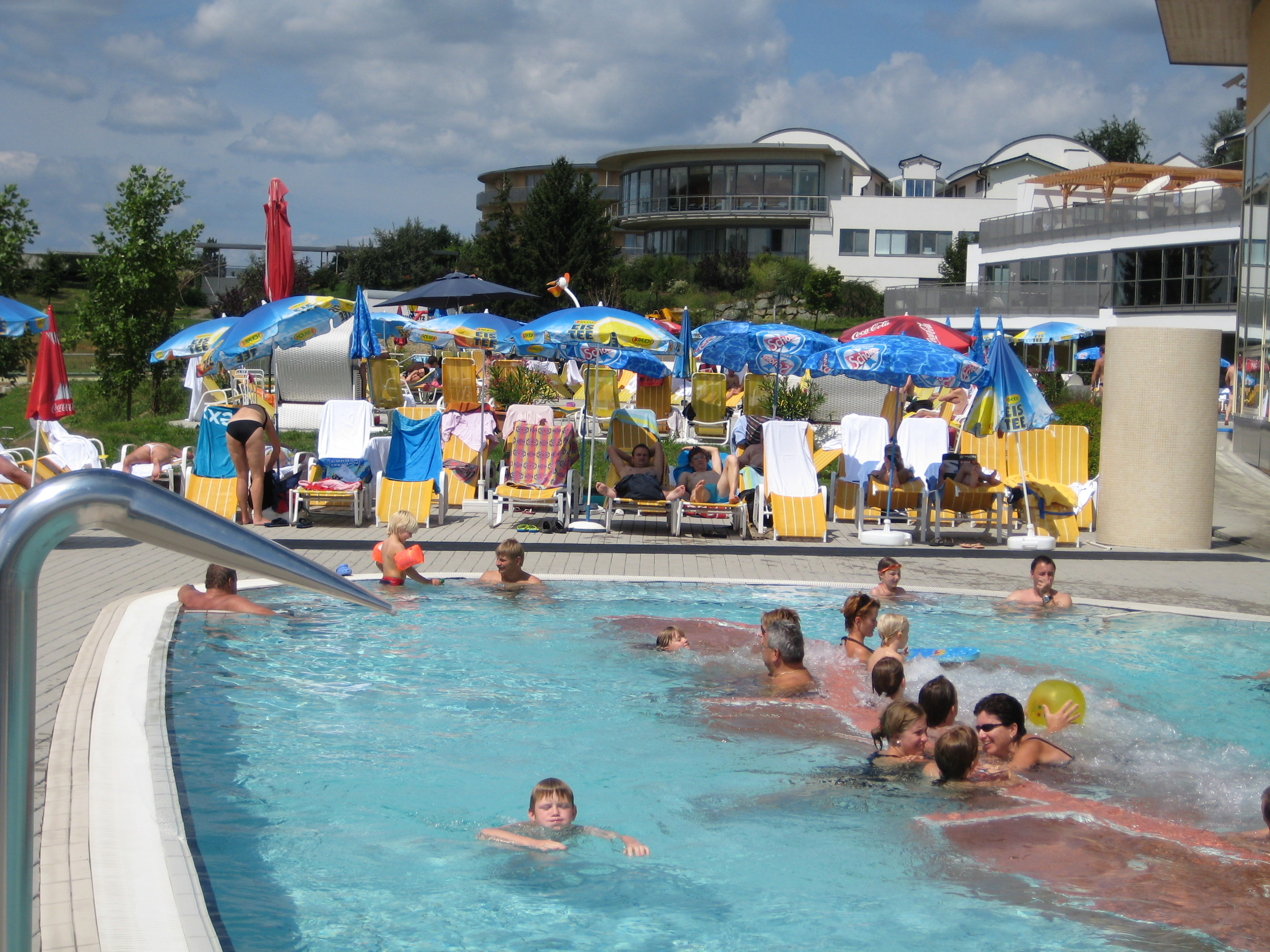 Aussenpool der Therme in Stegersbach im Südburgenland, Österreich.